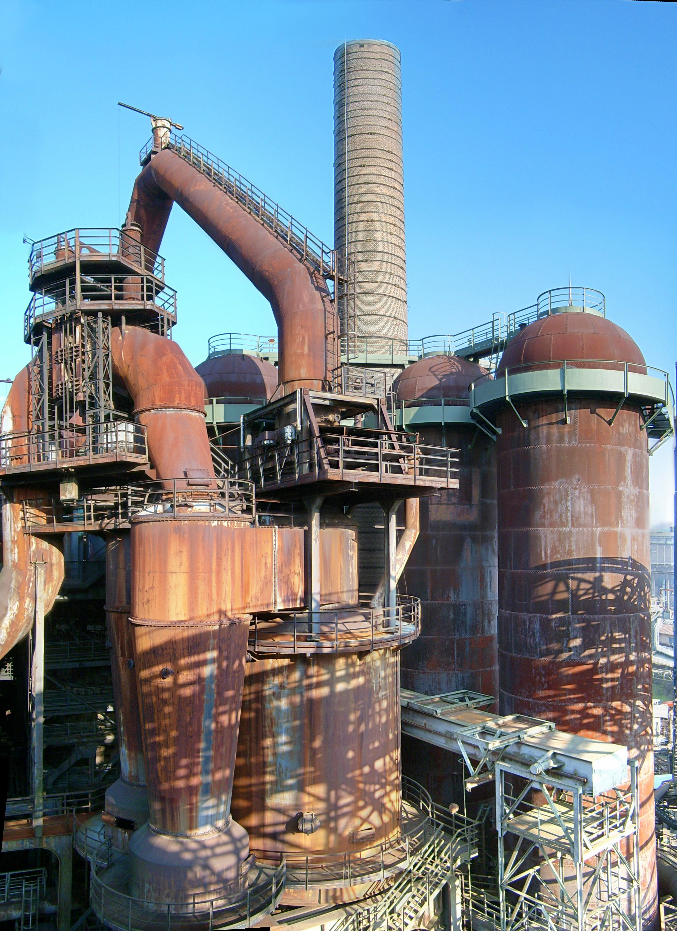 Hochöfen der Völklinger Hütte